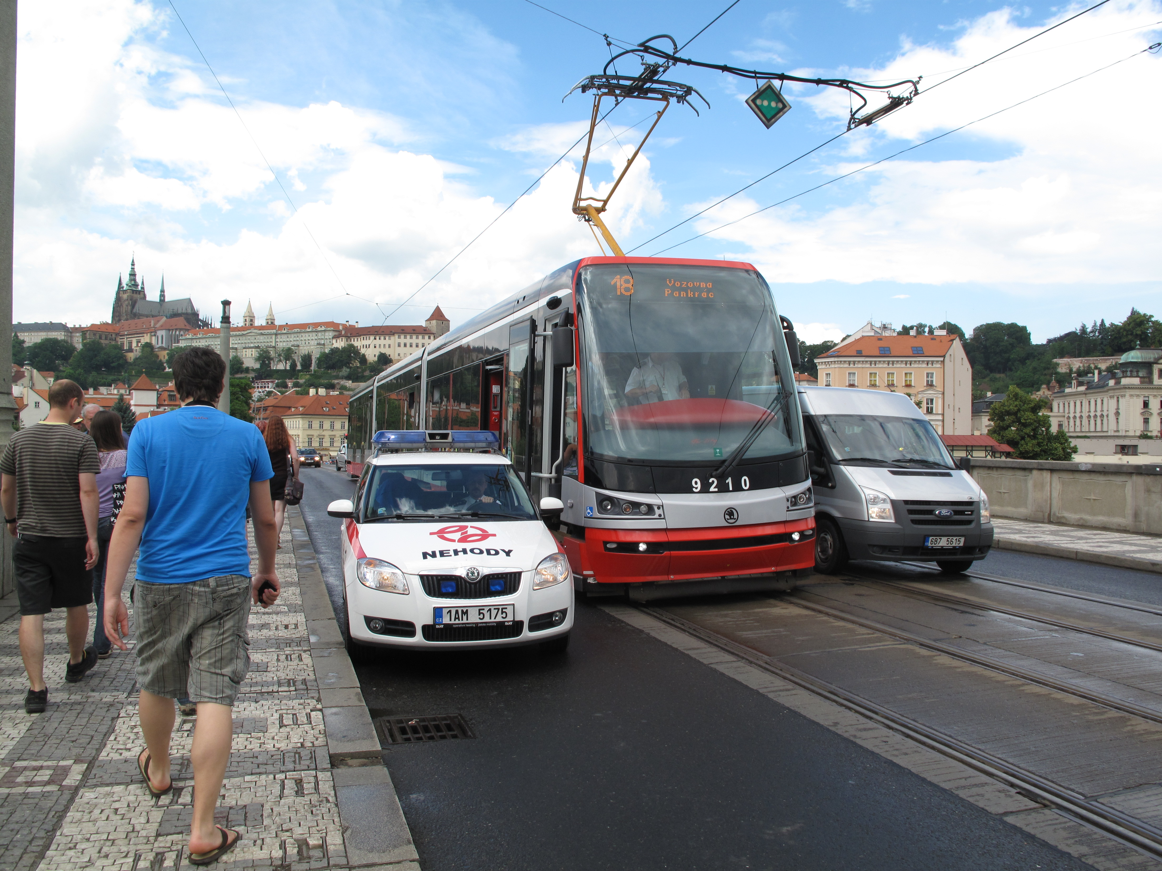 Praha, Mánesův most, tramvaj Škoda 15T stojící sběračem na izolátoru.